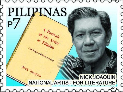 Nick Joaquin